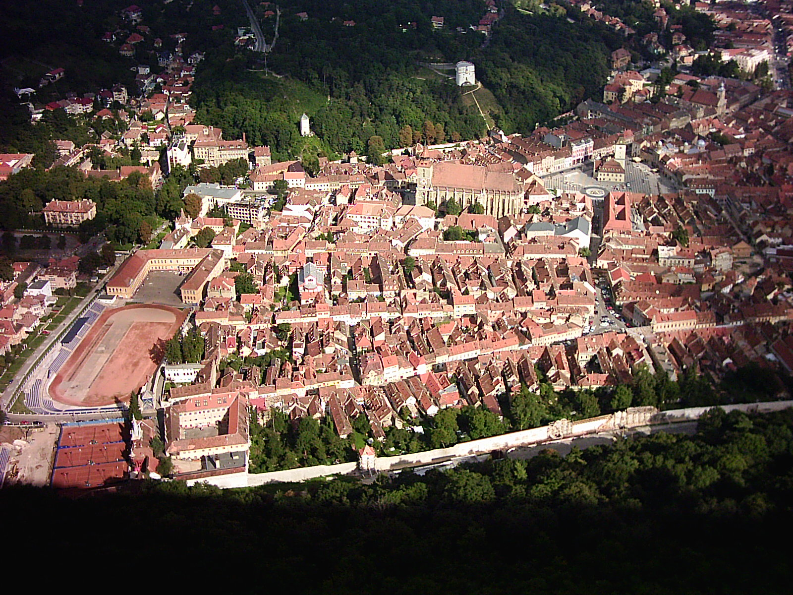 Brasov view from Tampa, Eigenaufnahme, September 2006